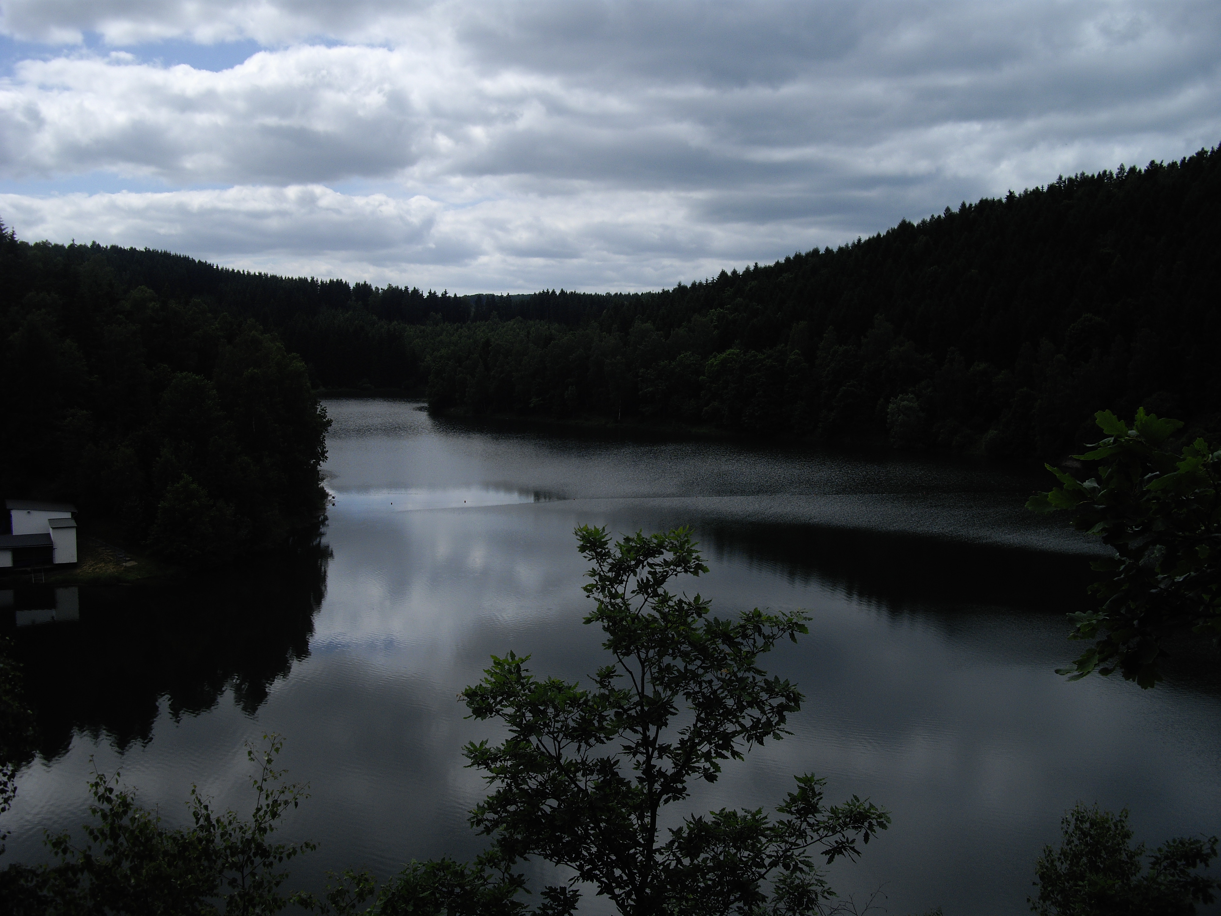 Blick über das Staubecken der Talsperre Wippra, fotografiert von einem Felsen östlich der Staumauer